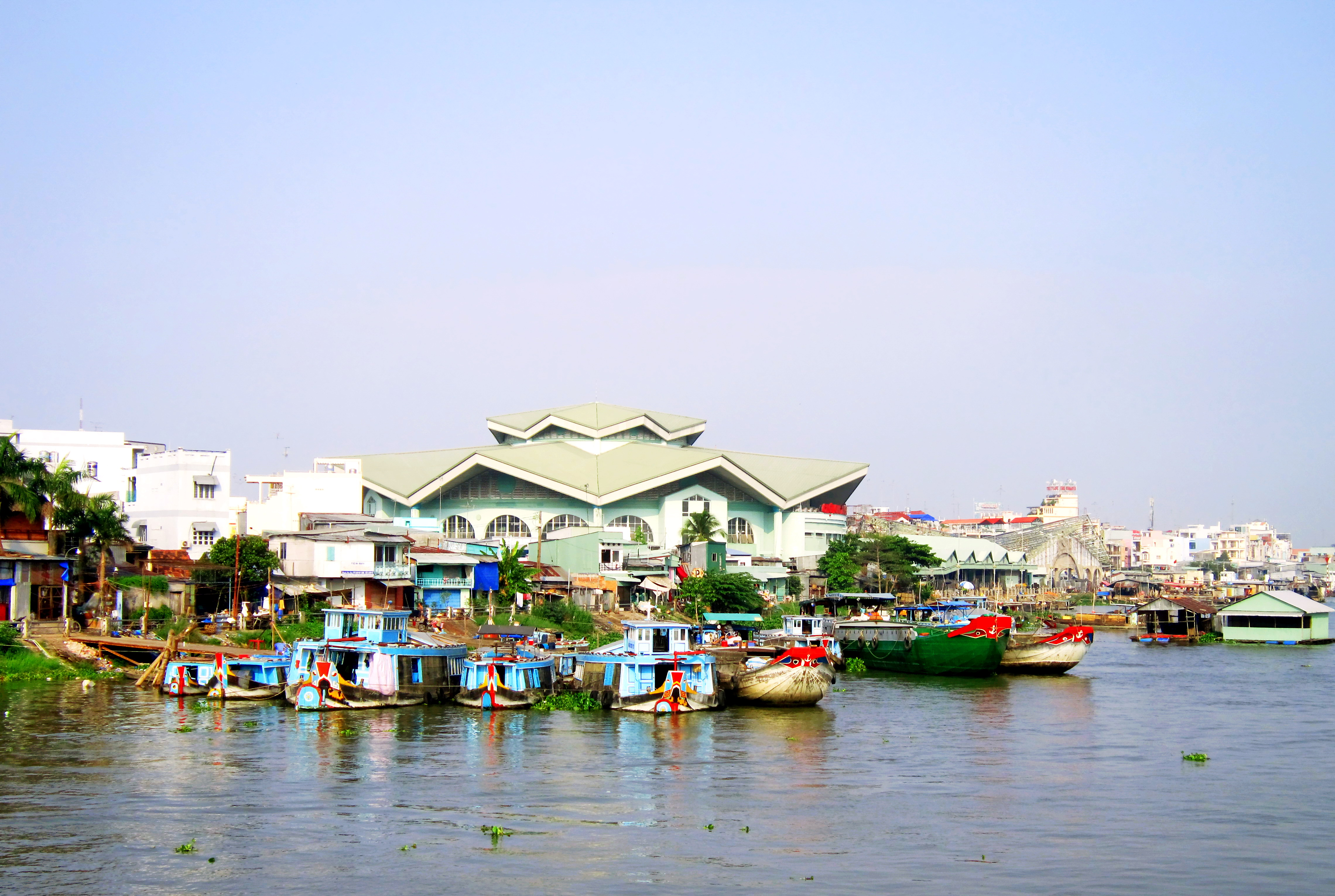 Chợ Long Xuyên (An Giang, Việt Nam) bên sông Hậu.